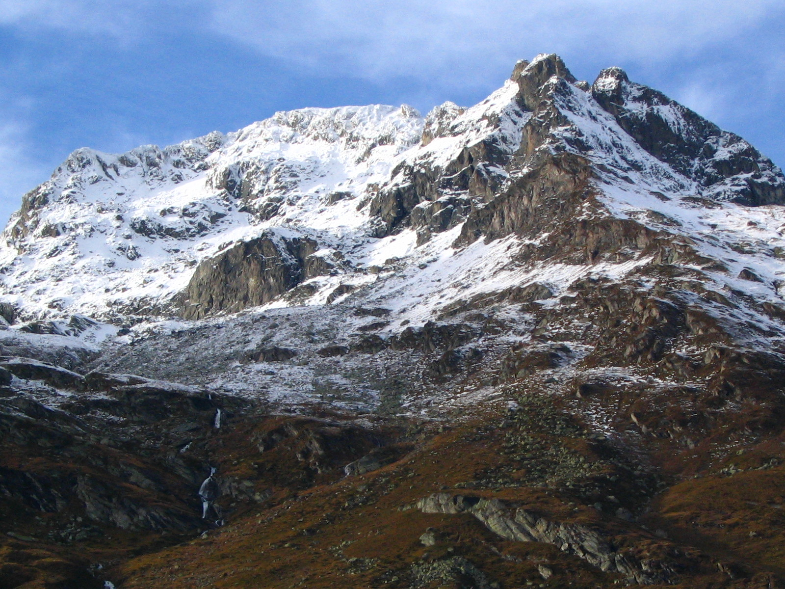 Piz Grevasalvas, Graubünden, Schweiz – links der Bildmitte der junge Inn